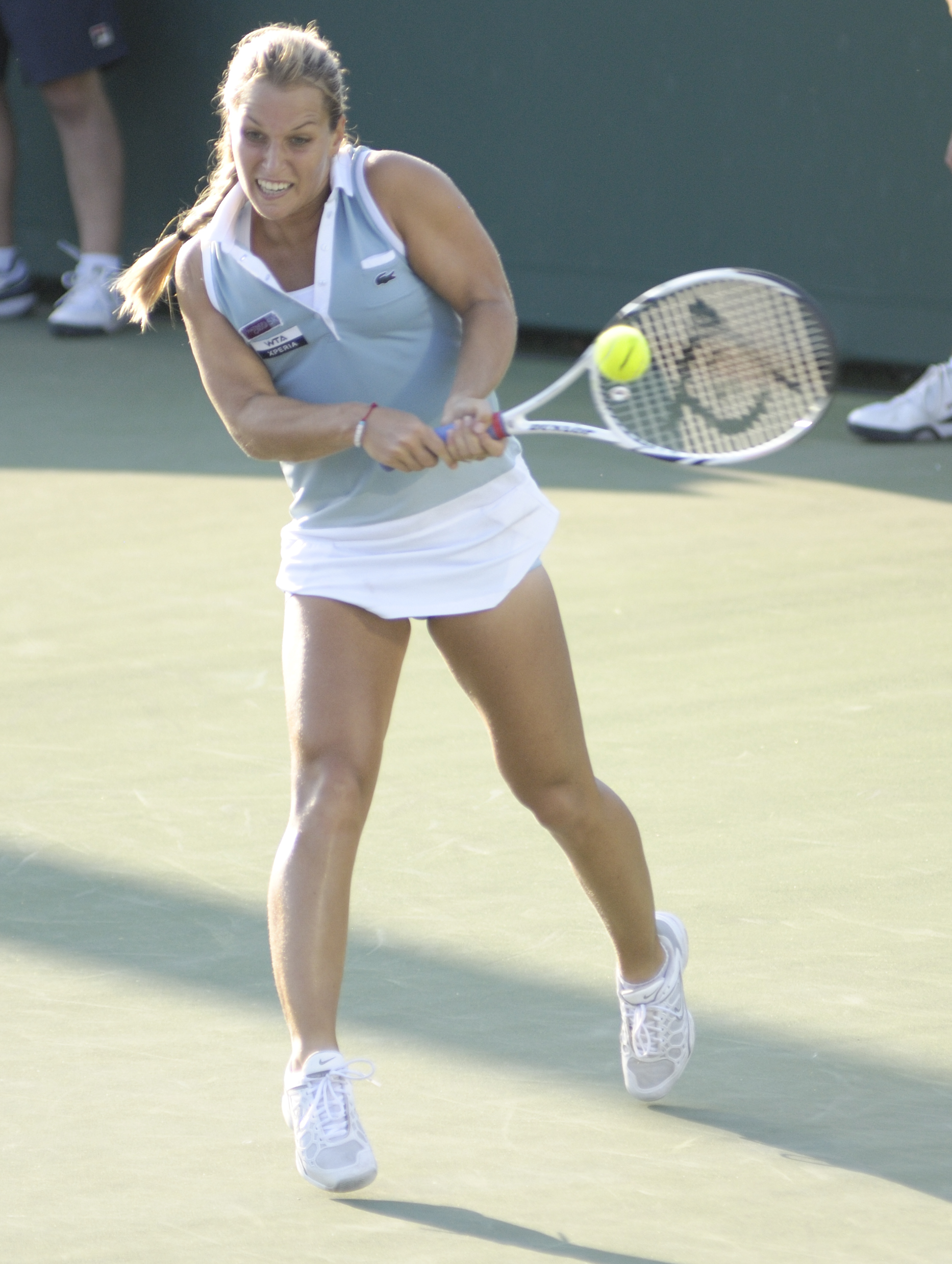 Dominika Cibulkova